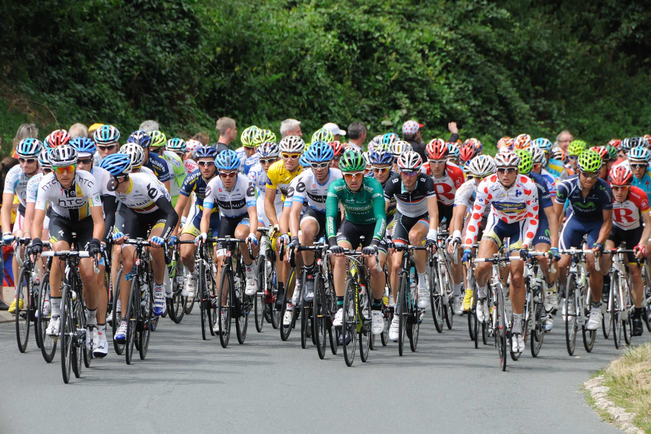 7e étape du Tour de France 2011 (Le Mans - Châteauroux) Le peloton dans la côte à la sortie de Chaumont (Loir-et-Cher)